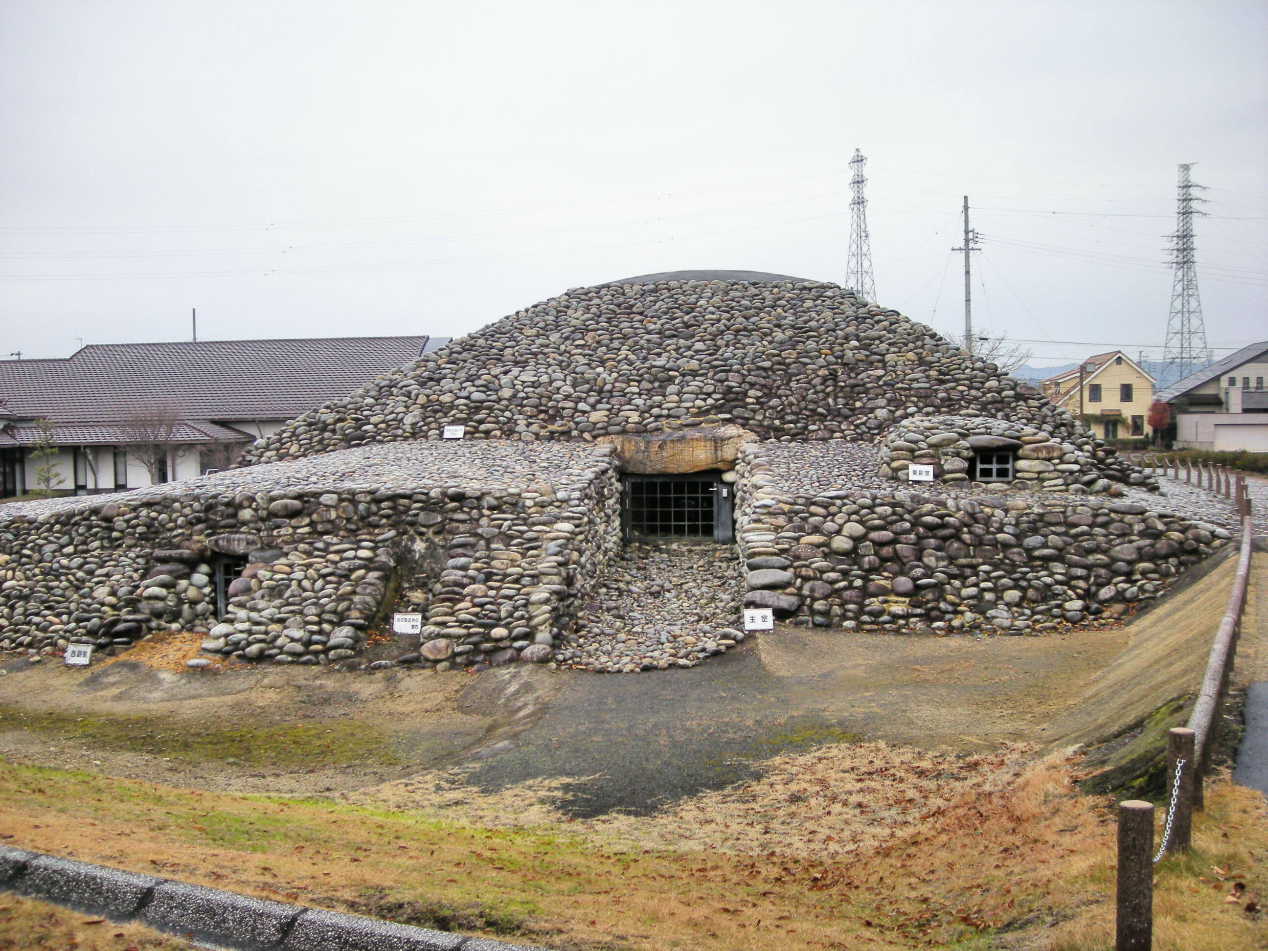 Jirobeeduka1goukofun（次郎兵衛塚一号墳）